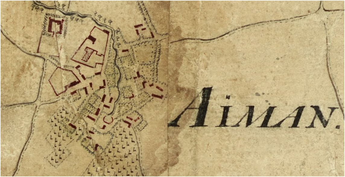 Plan du village d'Esmans en 1742